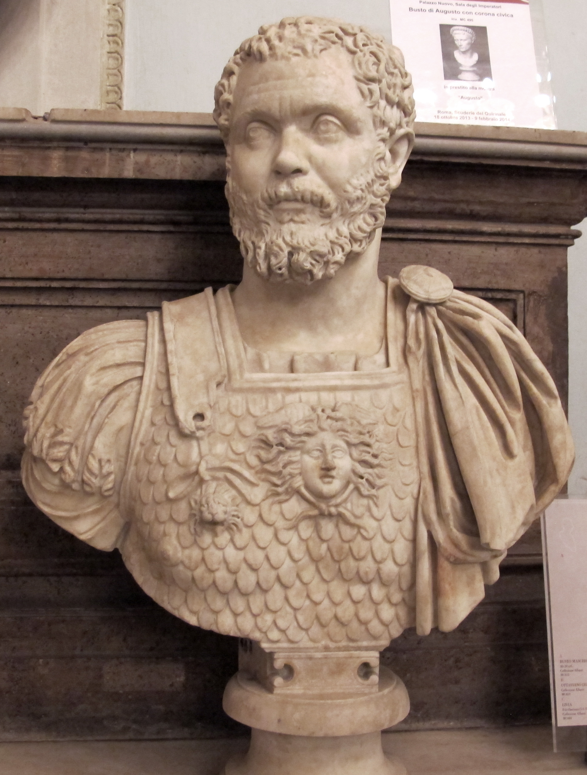 Musei Capitolini